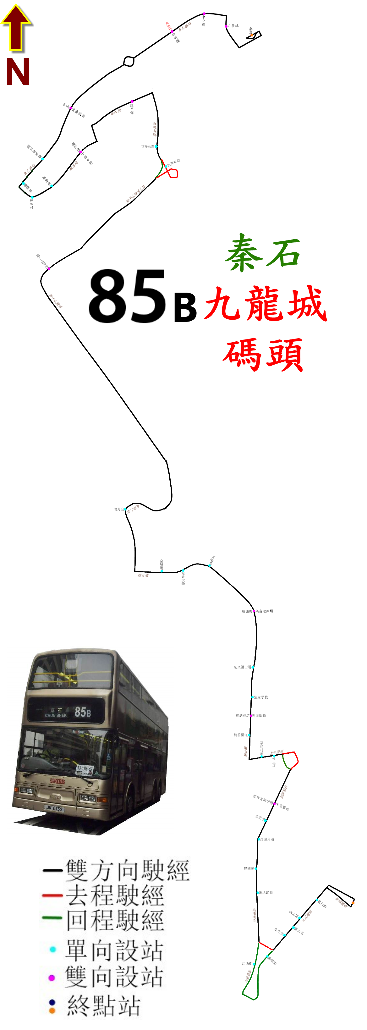 中文（香港）: 九巴85B線的走線圖